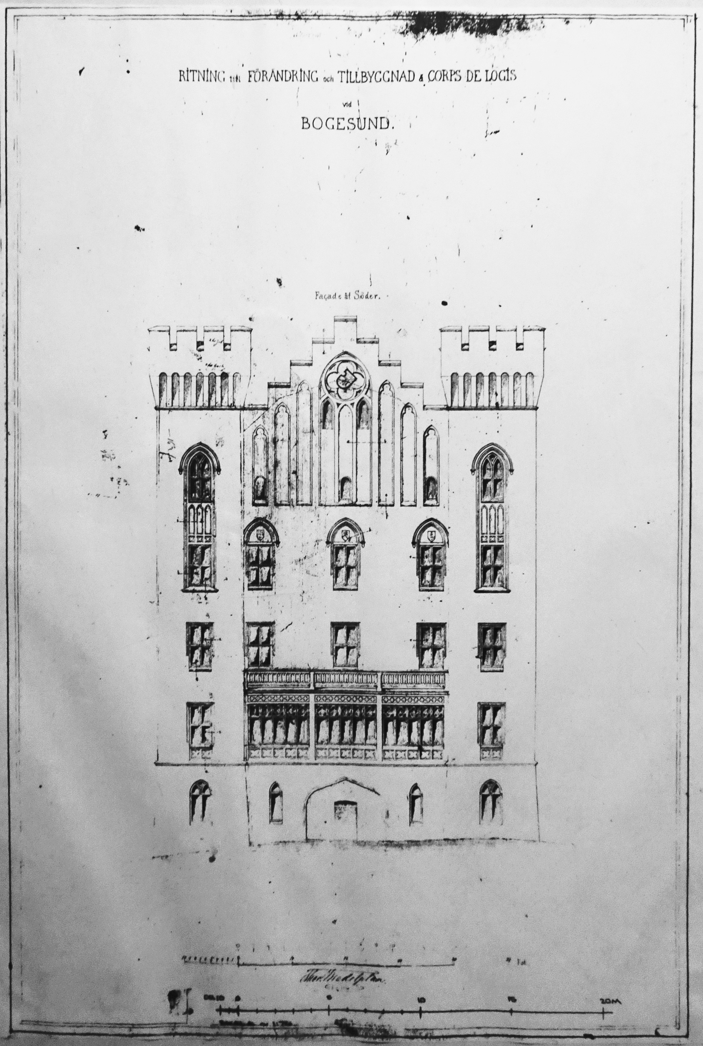 Fasadritning (mot söder), Bogesunds slott